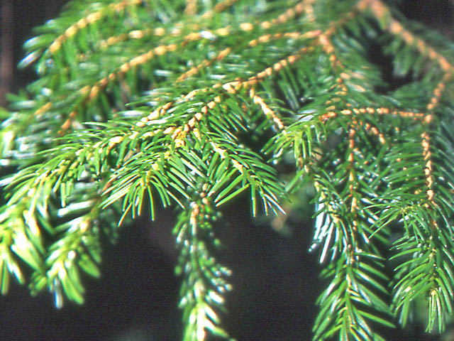 Hojas de Picea jezoensis var hondoensis, en Senjyou-dake, Sierra Akaishi,Japon トウヒの葉、南アルプス・仙丈岳で撮影